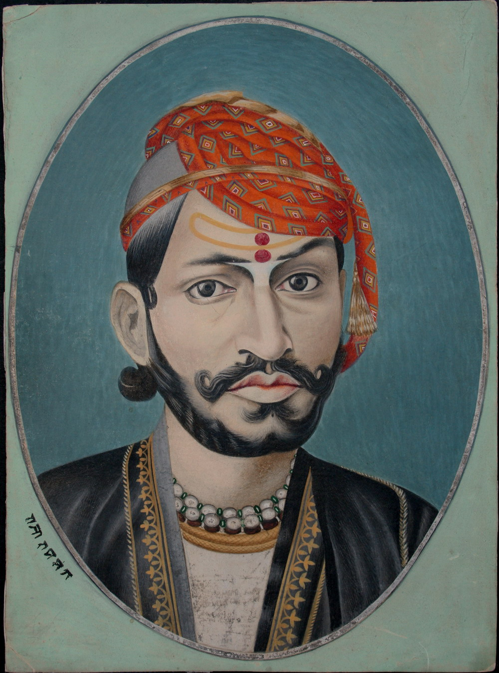 Maharaja Sawai Ram Singh II of Jaipur (r.1835-80).